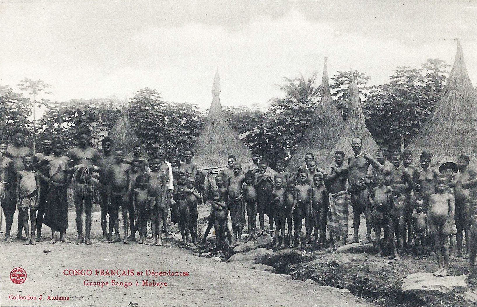 Groupe Sango à Mobaye (Haut Oubanghi). Collection J. Audema. Phot. A.B. & Cie, Nancy [Albert Bergeret] Congo Français et dépendances